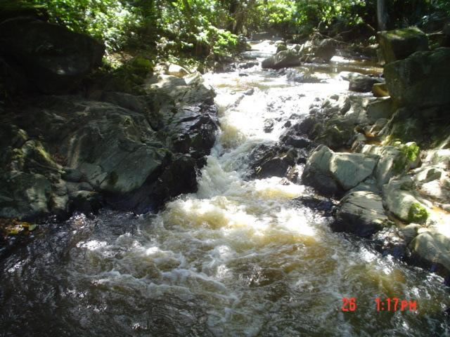 Cachoira de Sirinhaém